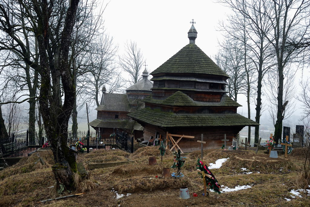 Вознесенська (Струків-ська) церква (дер.), смт.Ясіня